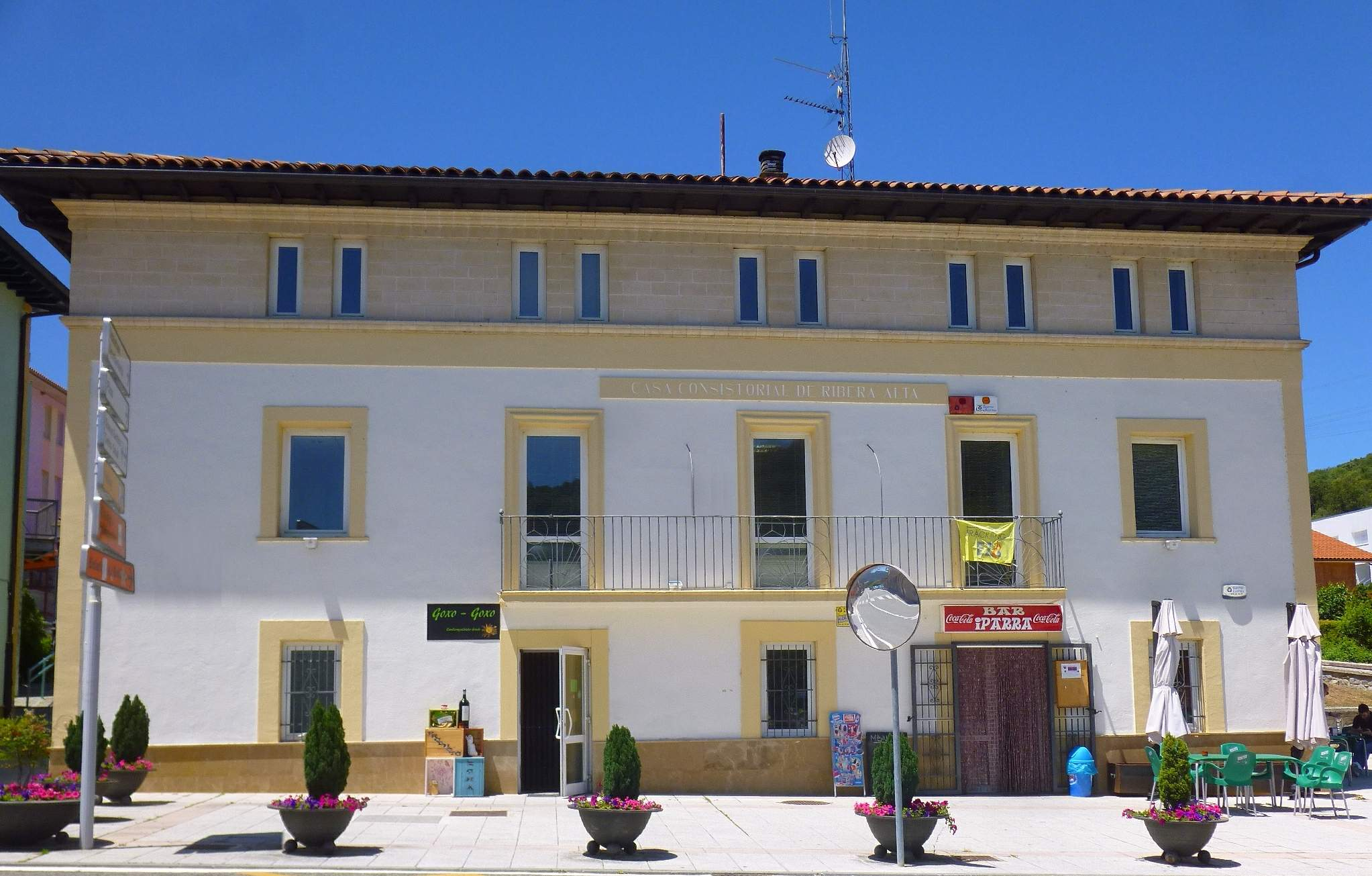 Pobes (Álava) - Ayuntamiento de Ribera Alta